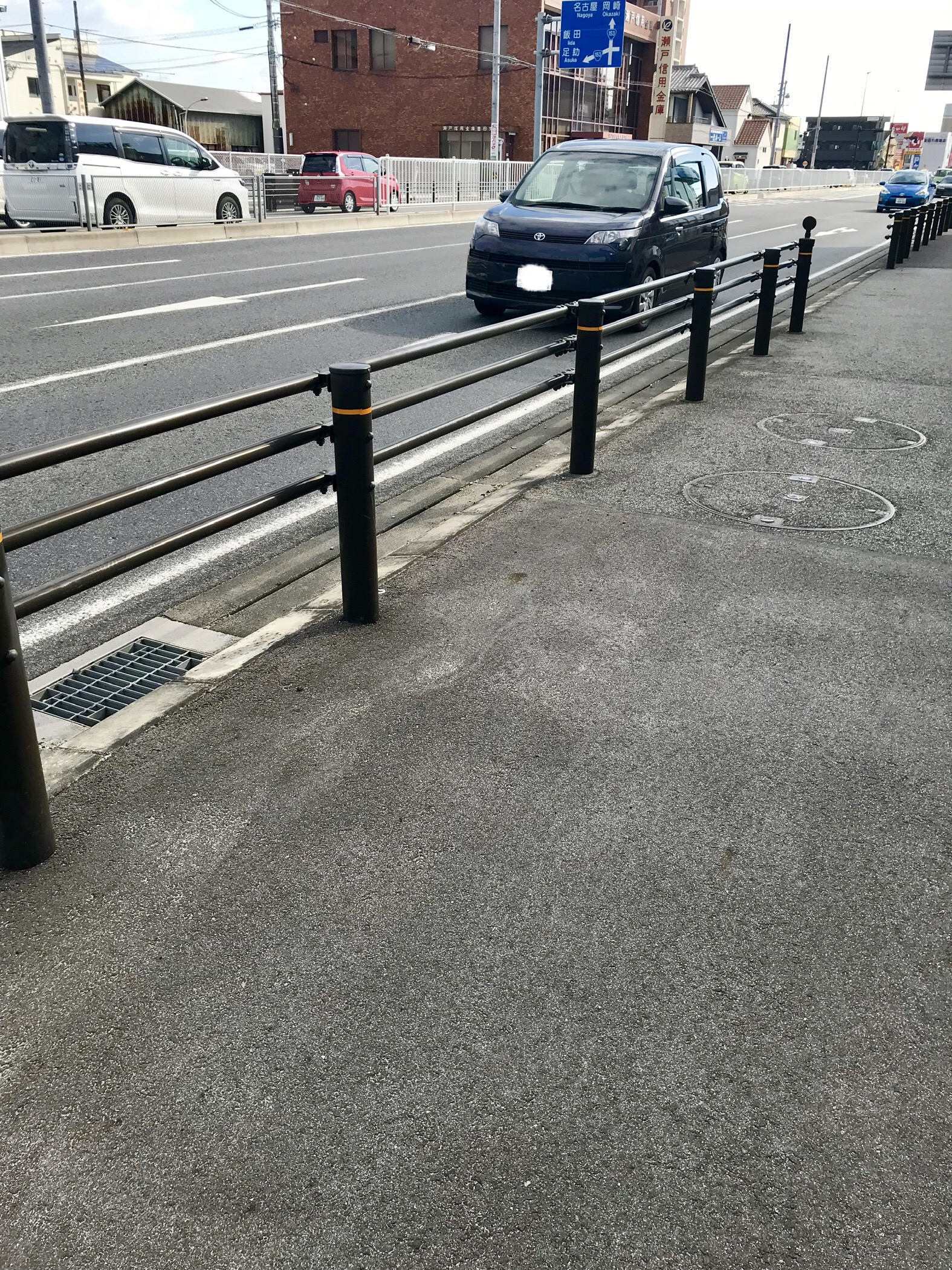 愛知県豊田市梅坪町の国道419号線 ガードレール左側が車道、ガードレール右側が歩道